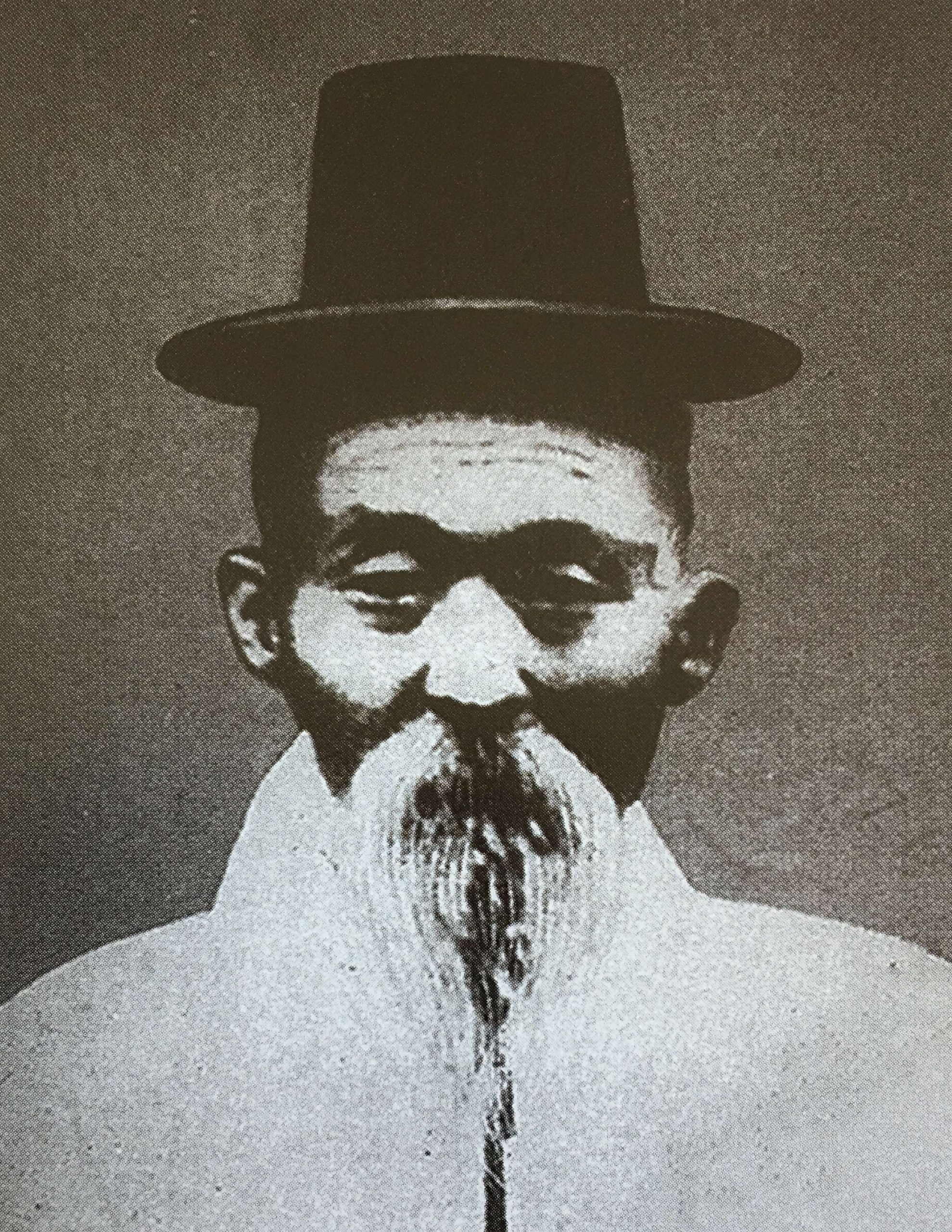 박정희 전 대통령의 아버지 박성빈(朴成彬)